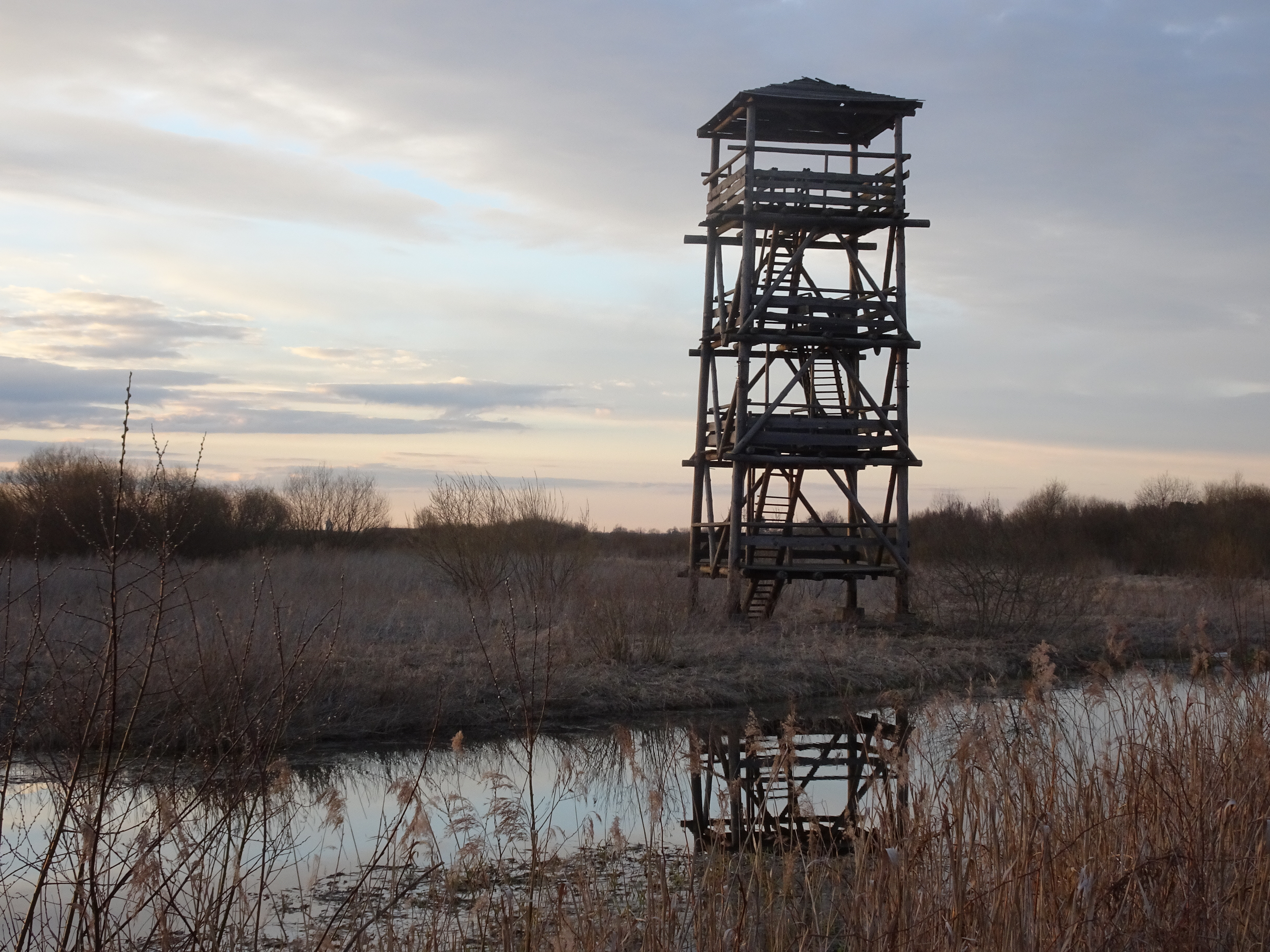 Linnuvaatlustorn Aardla järve ääres Tartumaal